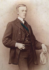 Porträtfotografie von Richard von Schlieben